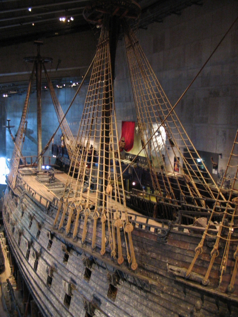 Zweeds oorlogsschip Vasa, gezien vanaf bakboordzijde - eigen werk (Sixtus) - vrijgegeven onder GFDL